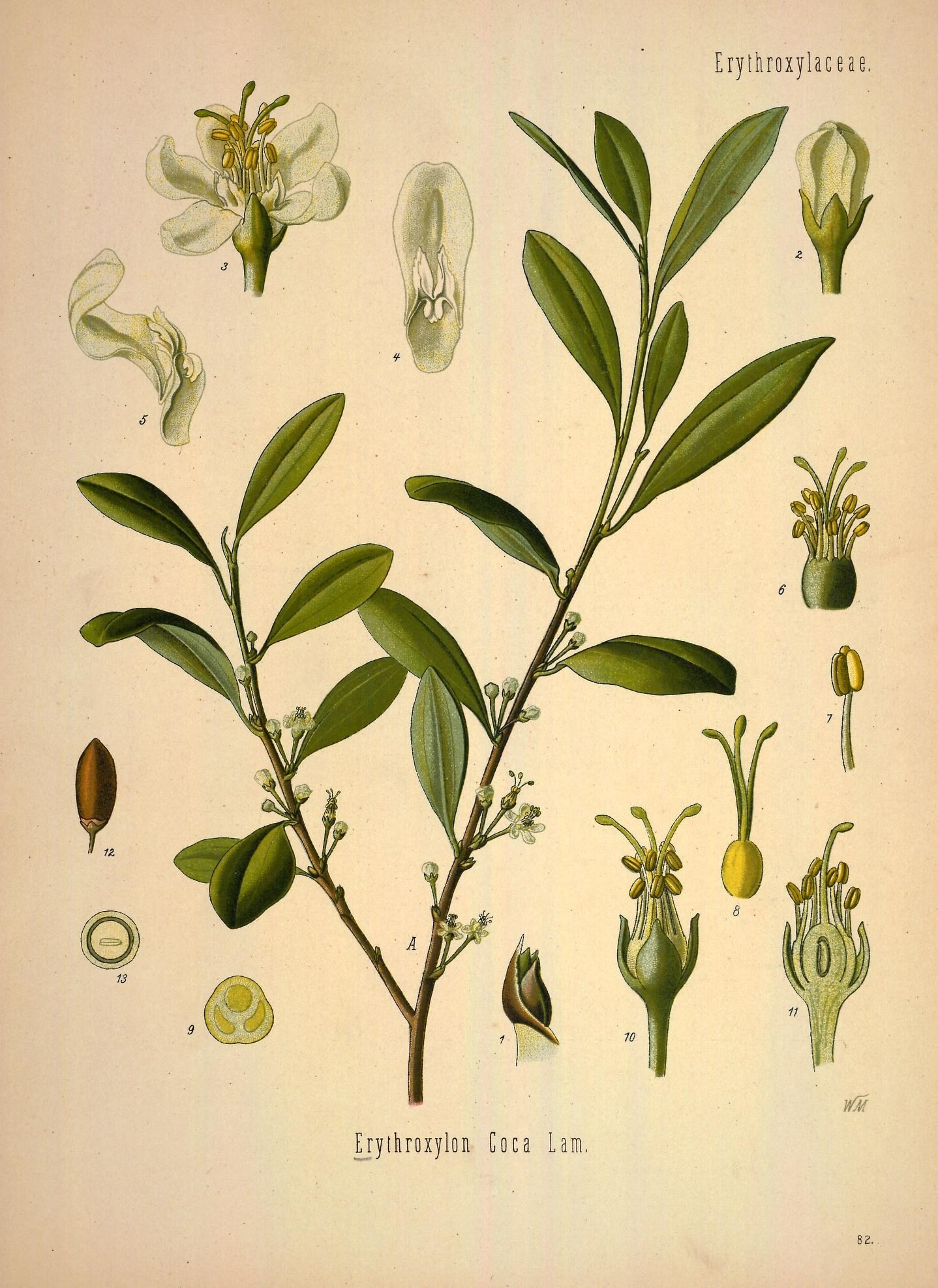 Coca. A blühender Zweig, natürl. Grösse; 1 Nebenblättchen, vergrössert; 2 Blüthenknospe, desgl.; 3 Blüthe, desgl.; 4 und 5 Kronblatt mit Ligula von vorn und von der Seite, desgl.; 6 innere Blüthentheile, Stempel mit den unten verwachsenen Staubgefässen, desgl.; 7 Staubgefäss, desgl.; 8 Stempel, desgl.; 9 Fruchtknoten im Querschnitt, mit einem fruchtbaren und 2 unfruchtbaren Fächern, desgl.; 10 Kelch mit den inneren Blüthentheilen, desgl.; 11 dieselbe Figur im Längsschnitt, desgl.; 12 Frucht, desgl.; 13 dieselbe zerschnitten, desgl.